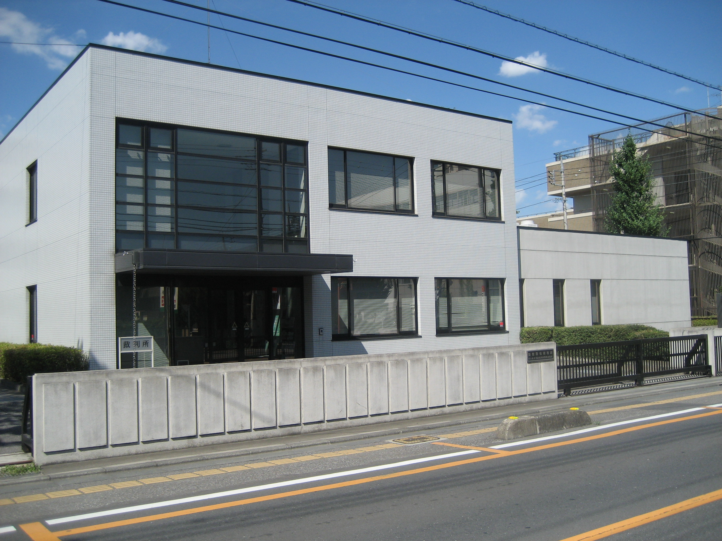 埼玉県飯能市にある飯能簡易裁判所